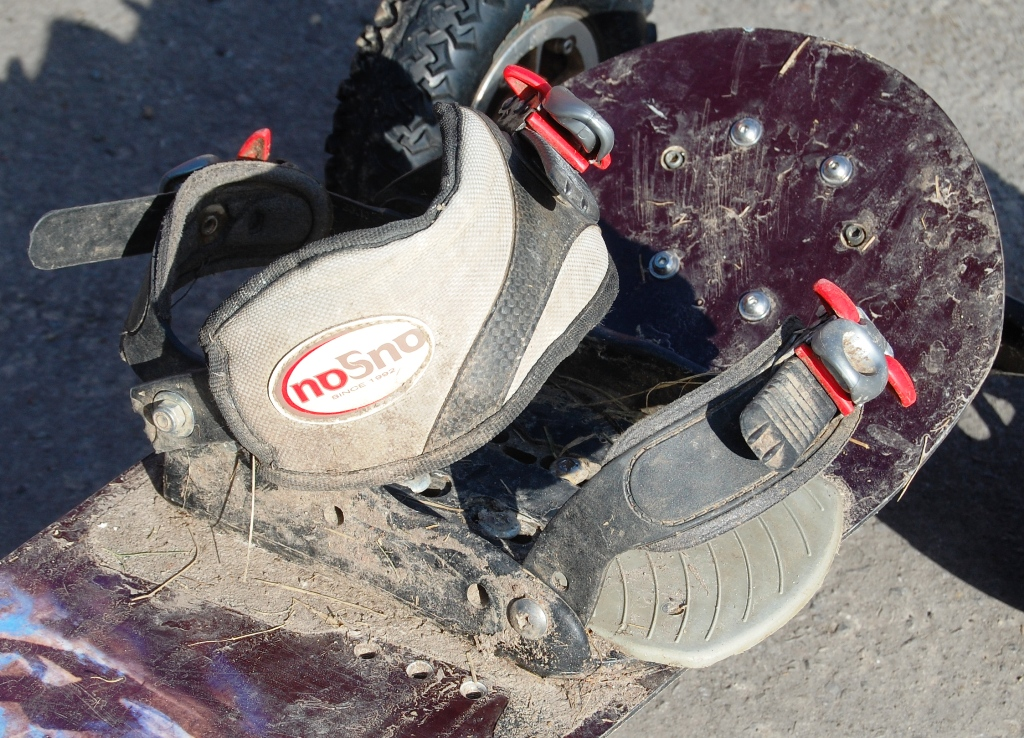 Fijacion Snow